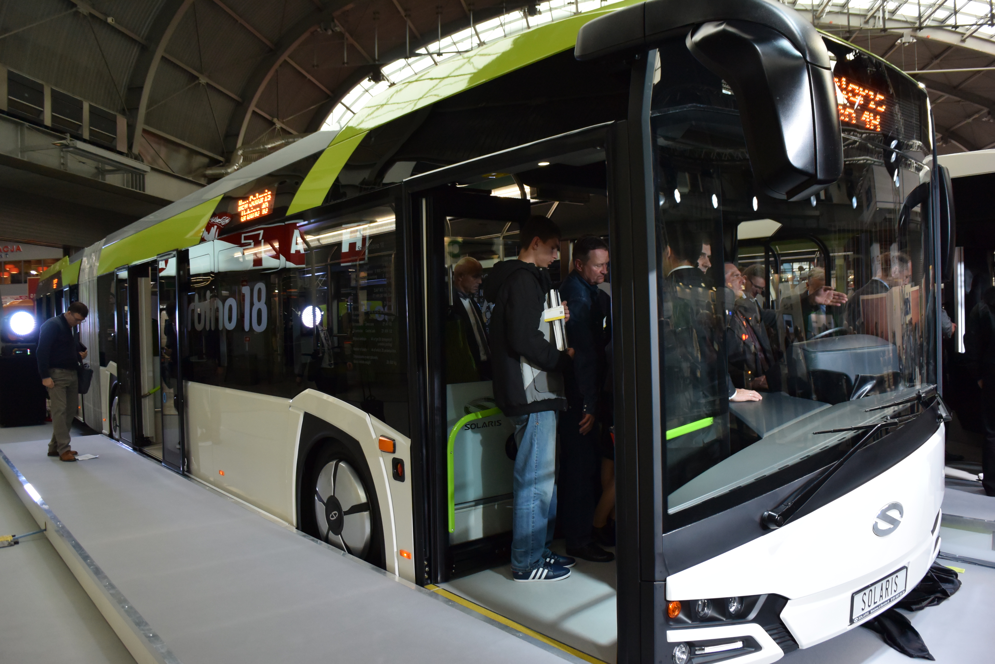 Polska premiera Nowego SOLARISa Urbino, Transexpo 2014, Kielce